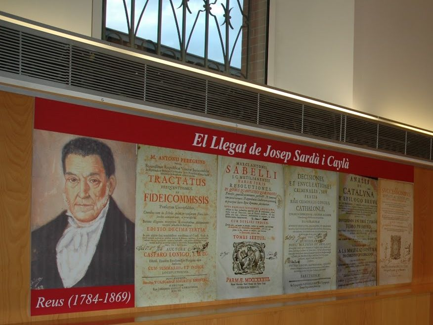 Exposició a la Biblioteca Central Xavier Amorós de Reus del llegat de Josep sardà i Cailà